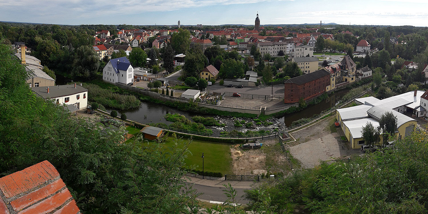 Ausblick vom Burgberg auf die Stadt Eilenburg